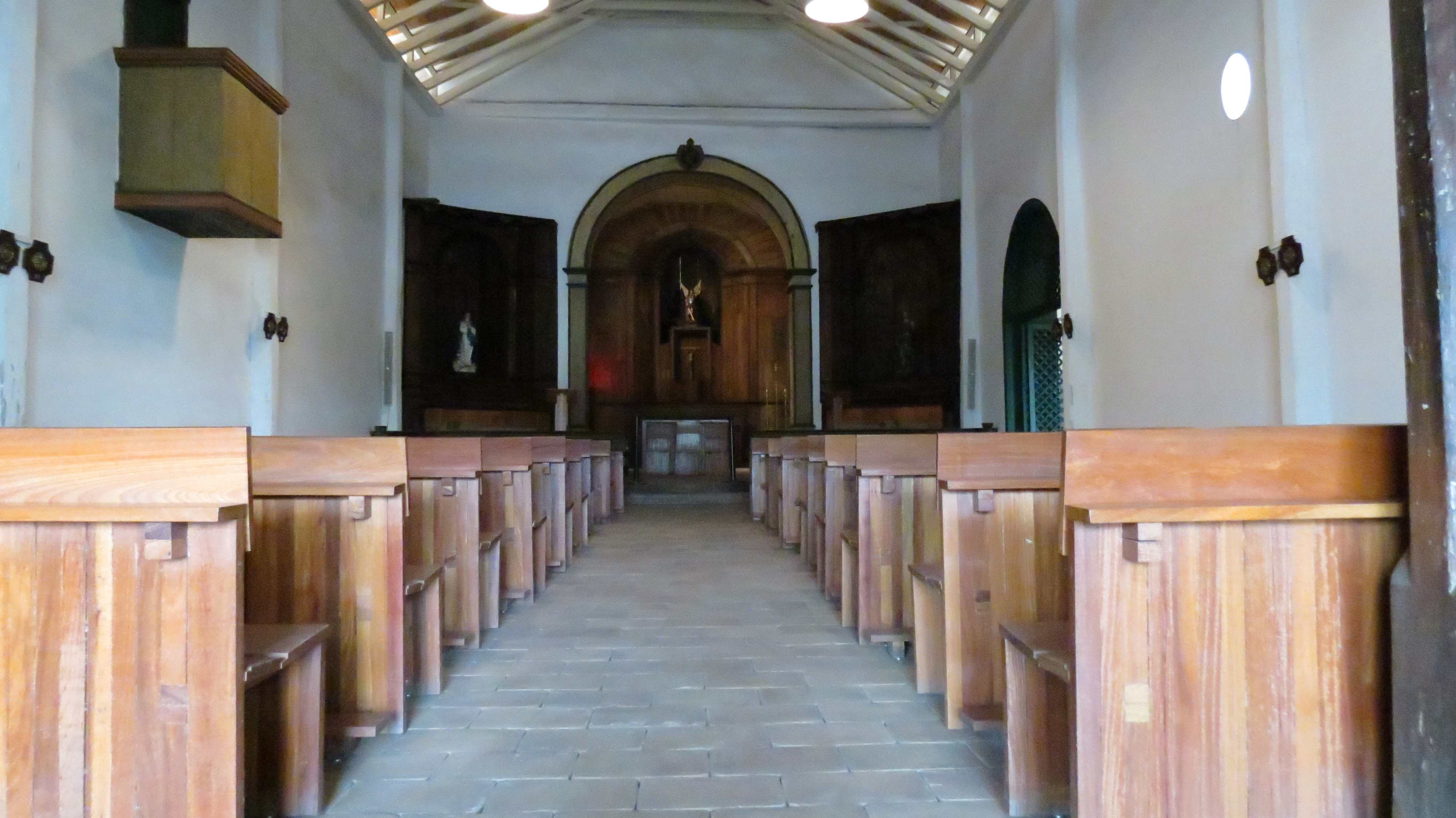 Vista central do altar